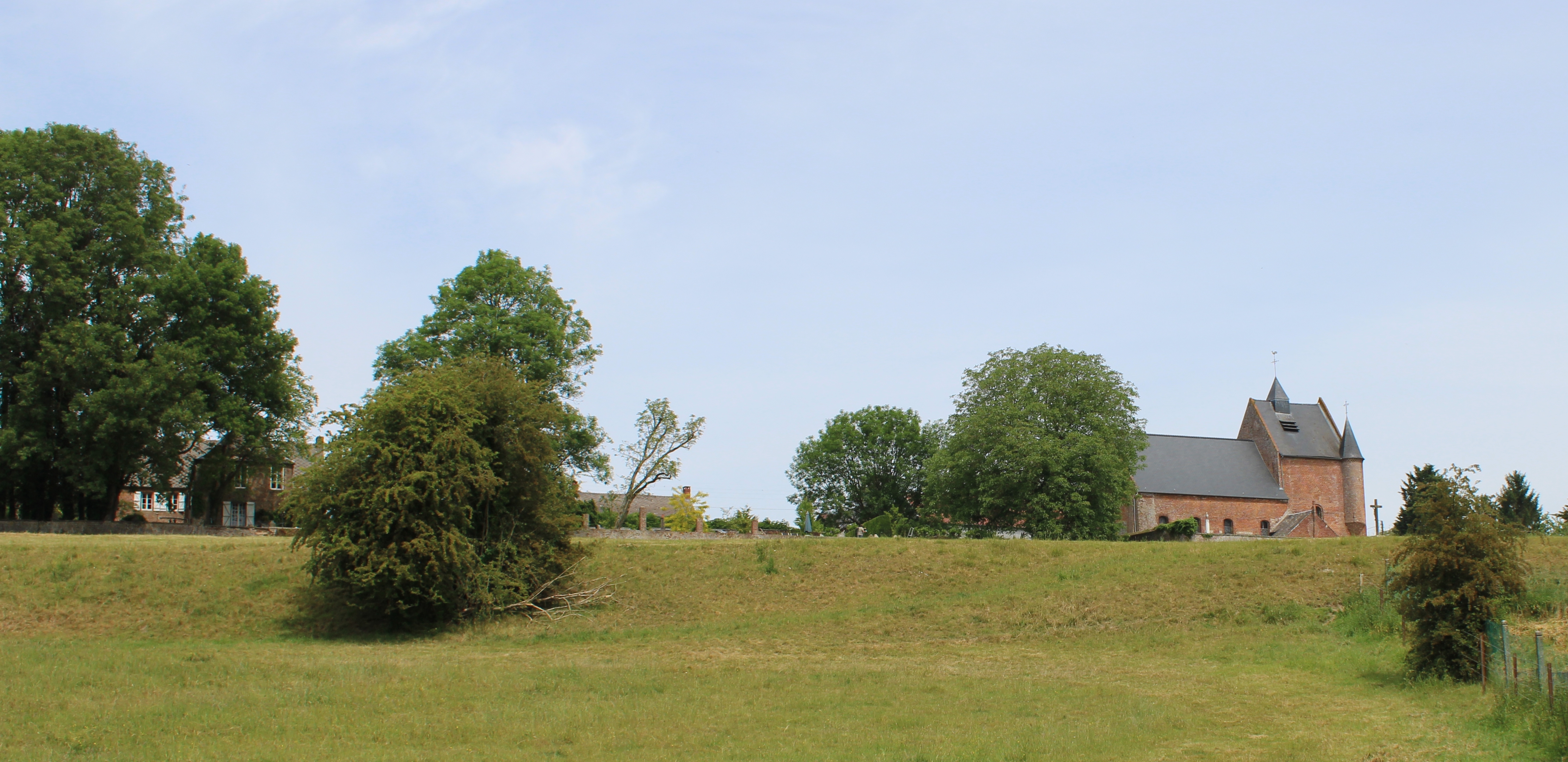 Panorama du village avec son église depuis l'Etang des Sources.